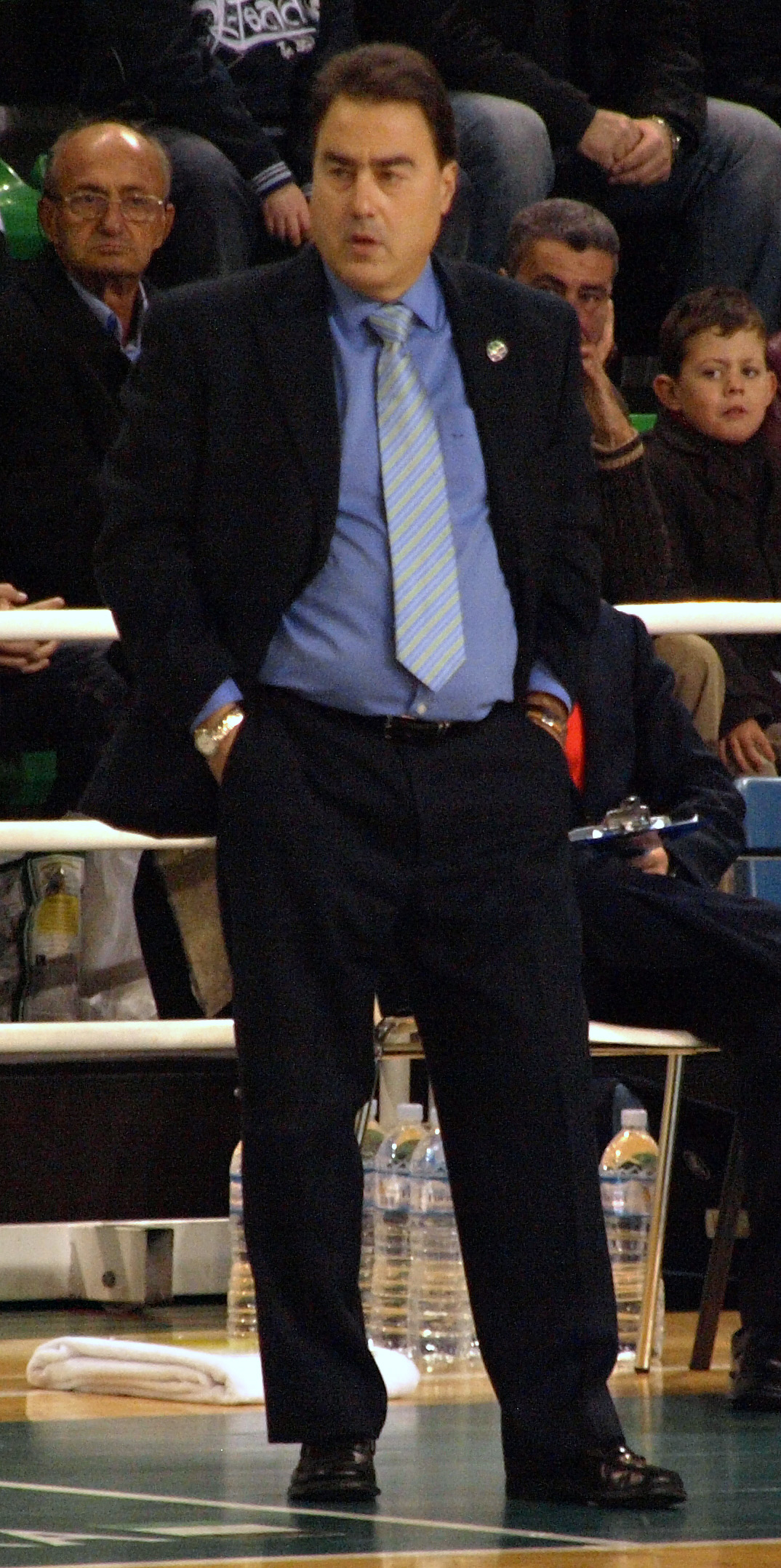 Gustavo Aranzana al mando del Cáceres 2016 Basket en un encuentro de LEB Oro de la temporada 2009/10 ante el UB La Palma en el Multiusos Ciudad de Cáceres